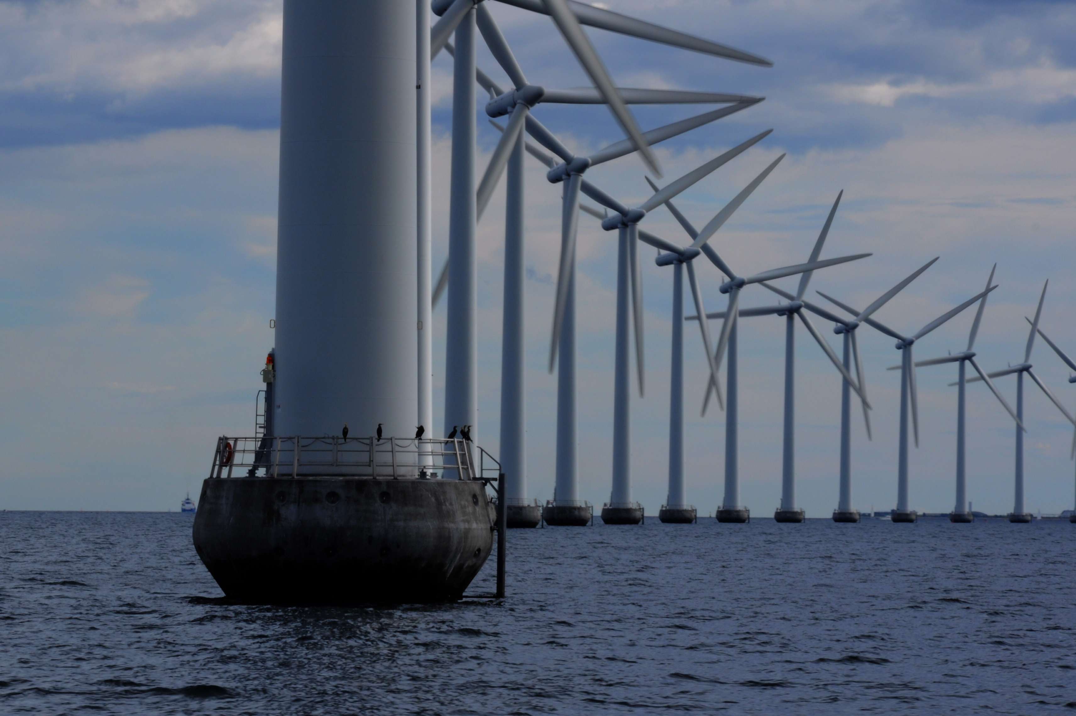 Windmill park in Oresund between Copenhagen, Denmark and Malmo, Sweden